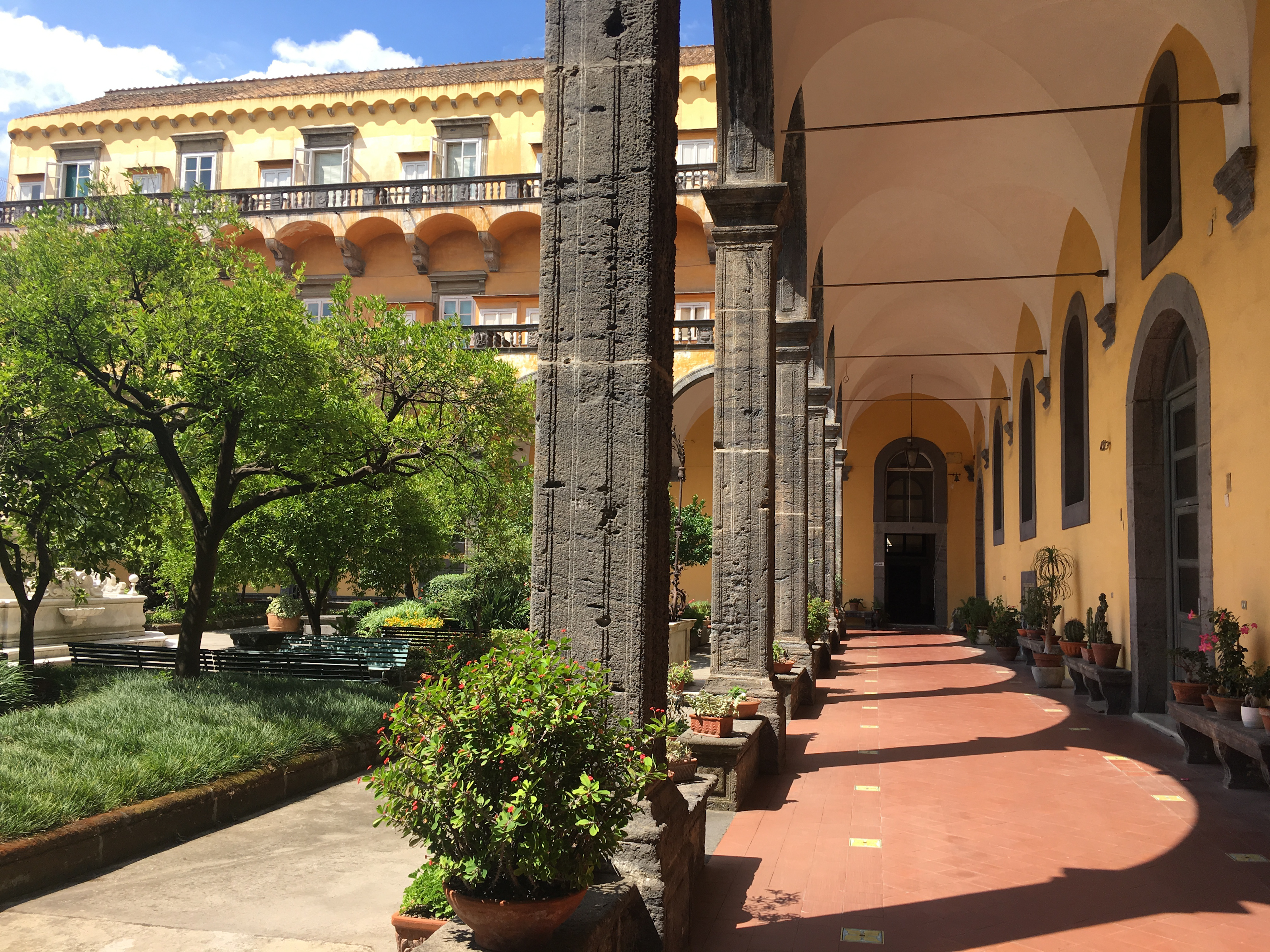 Chiostro di San Gregorio Armeno (Napoli)